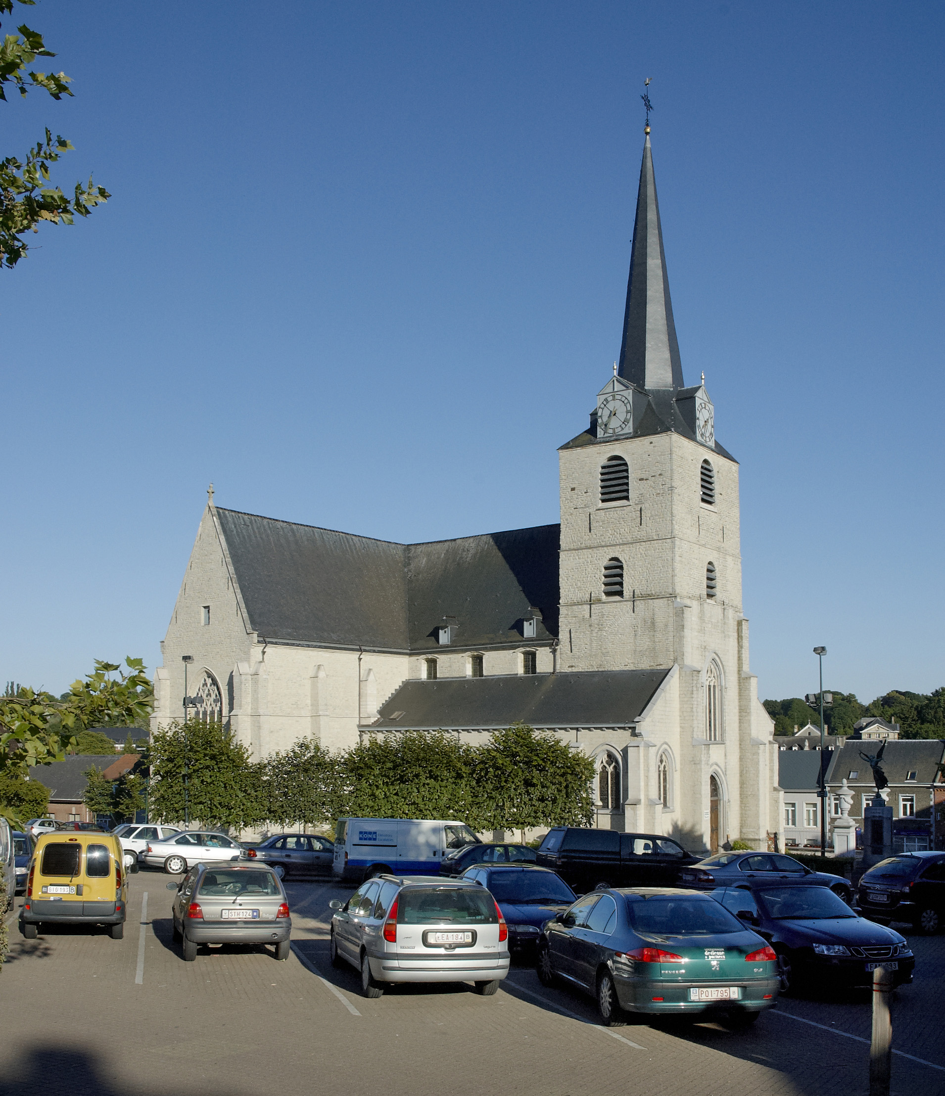 Kerk te Overijse, België, kijkend richt zuid-oost.